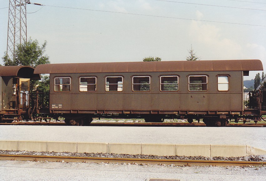 Wagen 63167 der GKB, erbaut 1929, Maschinen- und Waggonbau-Fabriks-Aktiengesellschaft in Simmering, Graz Mai 1989